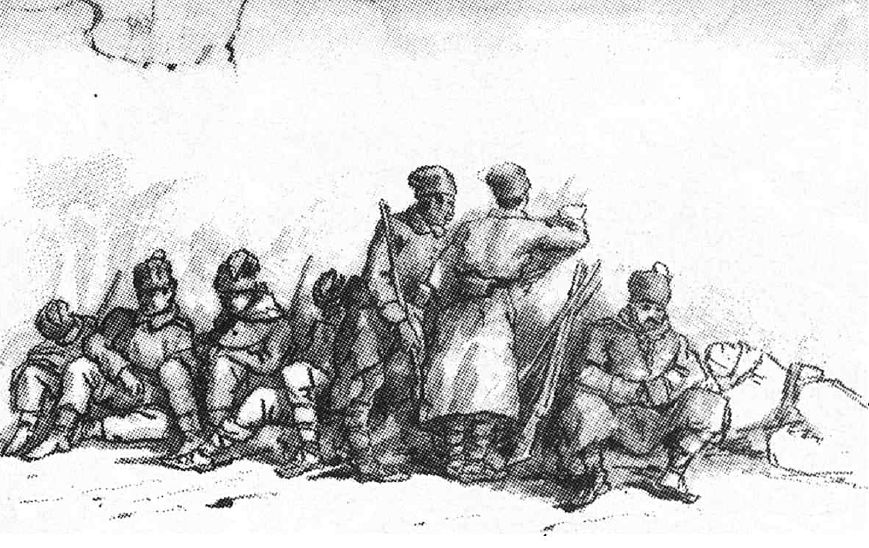 Carol Szathmari - Dorobanti in transee, creion și tuș, Muzeul Național de Artă, publicat în "Resboiul" no. 527/3 ianuarie 1879 sub titlul Soldați români în fața redutei de la Smârdan